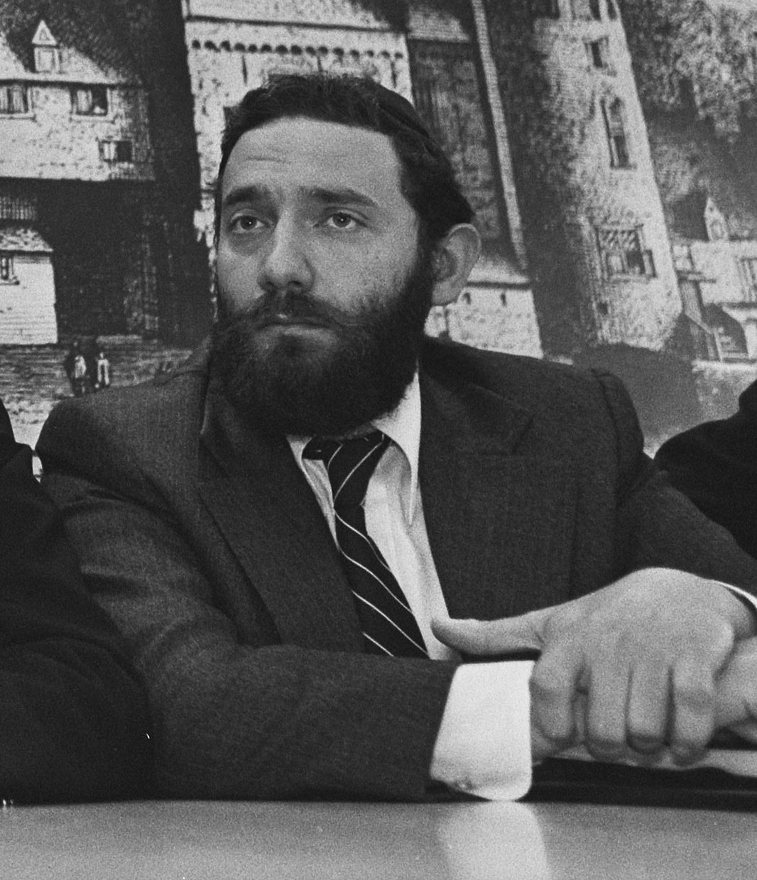 Collectie / Archief : Fotocollectie Anefo Reportage / Serie : Persconferentie van rabbijnen na het bezoek aan de plaatsvervangende Pauselijke Nuntius. Aanleiding was het protest tegen de ontvangst van PLO-leider Arafat door de Paus Beschrijving : V.l.n.r. de rabbijnen E.A. Rodrigues Pereira, Just en Arjeh Ralbag Datum : 14 september 1982 Trefwoorden : jodendom, persconferenties, rabbijnen Persoonsnaam : Just, M., Ralbag, A.L., Rodrigues Pereira, E.A. Fotograaf : Croes, Rob C. / Anefo Auteursrechthebbende : Nationaal Archief Materiaalsoort : Negatief (zwart/wit) Nummer archiefinventaris : bekijk toegang 2.24.01.05 Bestanddeelnummer : 932-3241